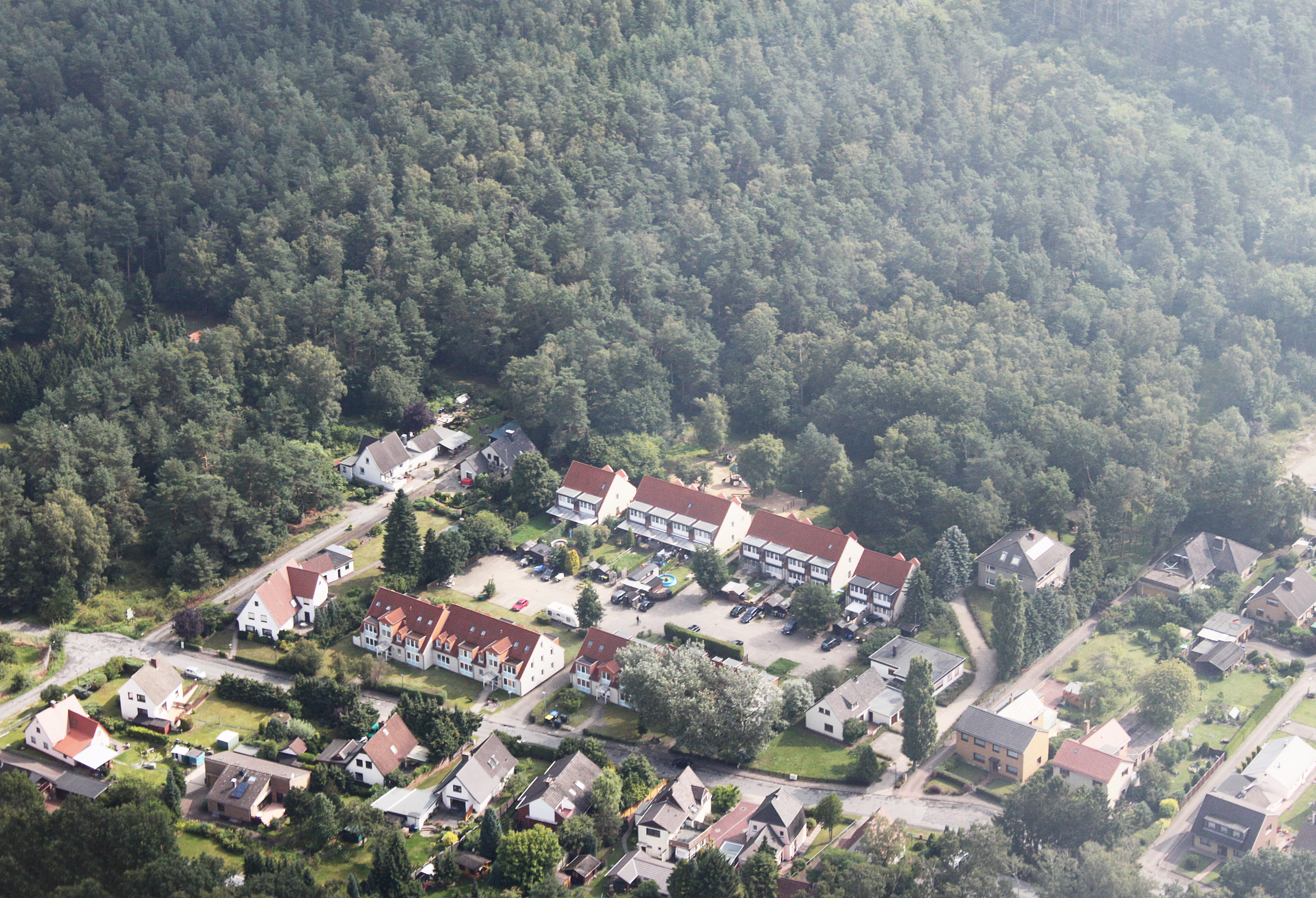 Wohnbebauung an der Straße Am Schützenplatz (in Nord-Süd-Richtung verlaufend = im unteren Bilddrittel, etwa parallel zum unteren Bildrand) in Bremen-Blumenthal; im Osten (= Blickrichtung des Luftbildes) angrenzend das ausgedehnte Waldgebiet der Neuenkirchener Heide, hier eine Teilfläche des sogenannten "WIFO-Waldes" im Bereich des Tanklagers Farge. Das Luftbild stammt vom: Fotoflug Bremen; Flughöhe 500 m; Luftbilder Bremen-Nord; Flug entlang der Weser von West nach Ost, über dem linken Weserufer, mit Blickrichtung zum rechten Weserufer.